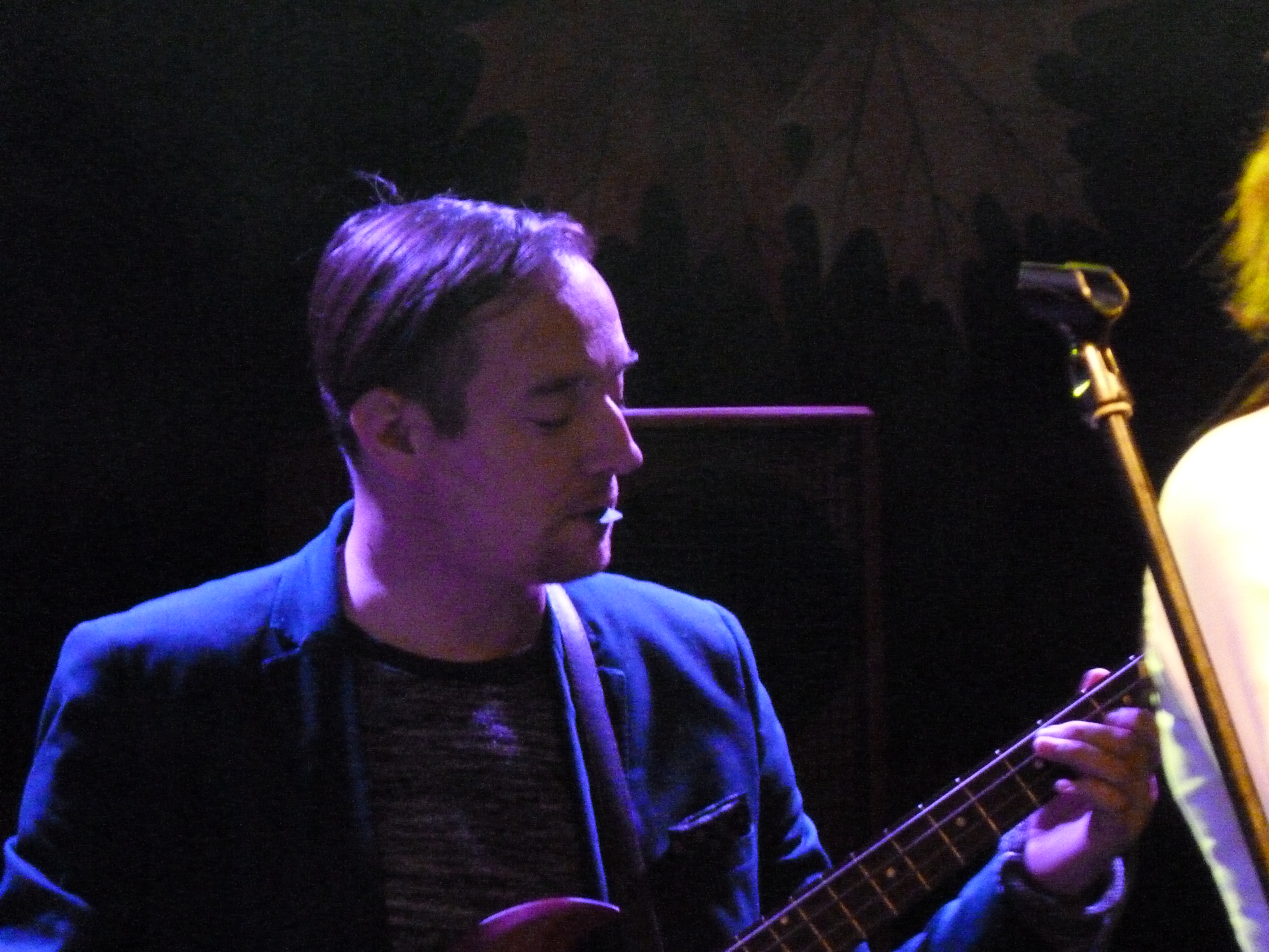 A felvétel 2014. október 11-én, vasárnap készült Budapesten, a Terézvárosban. Terézvárosi Búcsú, Eötvös utca, az Eötvös utca 10 Kulturális Központ előtt. Magashegyi Underground. ©© Derzsi Elekes Andor, Budapest, 2014, A kép és filmfelvételek egészben, vagy részletekben másolását, bármilyen úton történő sokszorosítását és felhasználását a szerző ellenérték nélkül, jogutódjaira is kihatóan megengedi. Az engedély kiterjed a kereskedelmi célú hasznosításra is. Kéri azonban nevének feltüntetését a felhasználás során. A Metapolisz sorozat valamennyi képe és filmje Creative Commons alatti valamint kereskedelmi - for profit - célra is felhasználható. Ajánlott hivatkozás: Derzsi Elekes Andor: Metapolisz DVD line